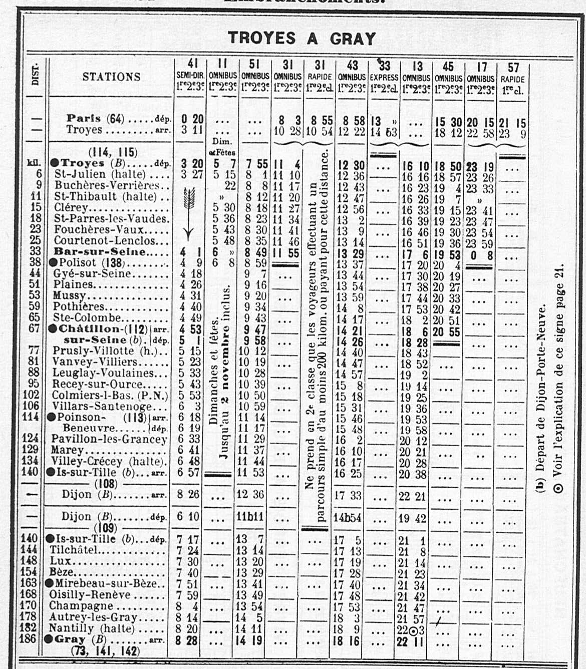 Horaires de la ligne de Troyes à Gray (sens aller) en mai 1914. Extrait du livret Chaix de mai 1914